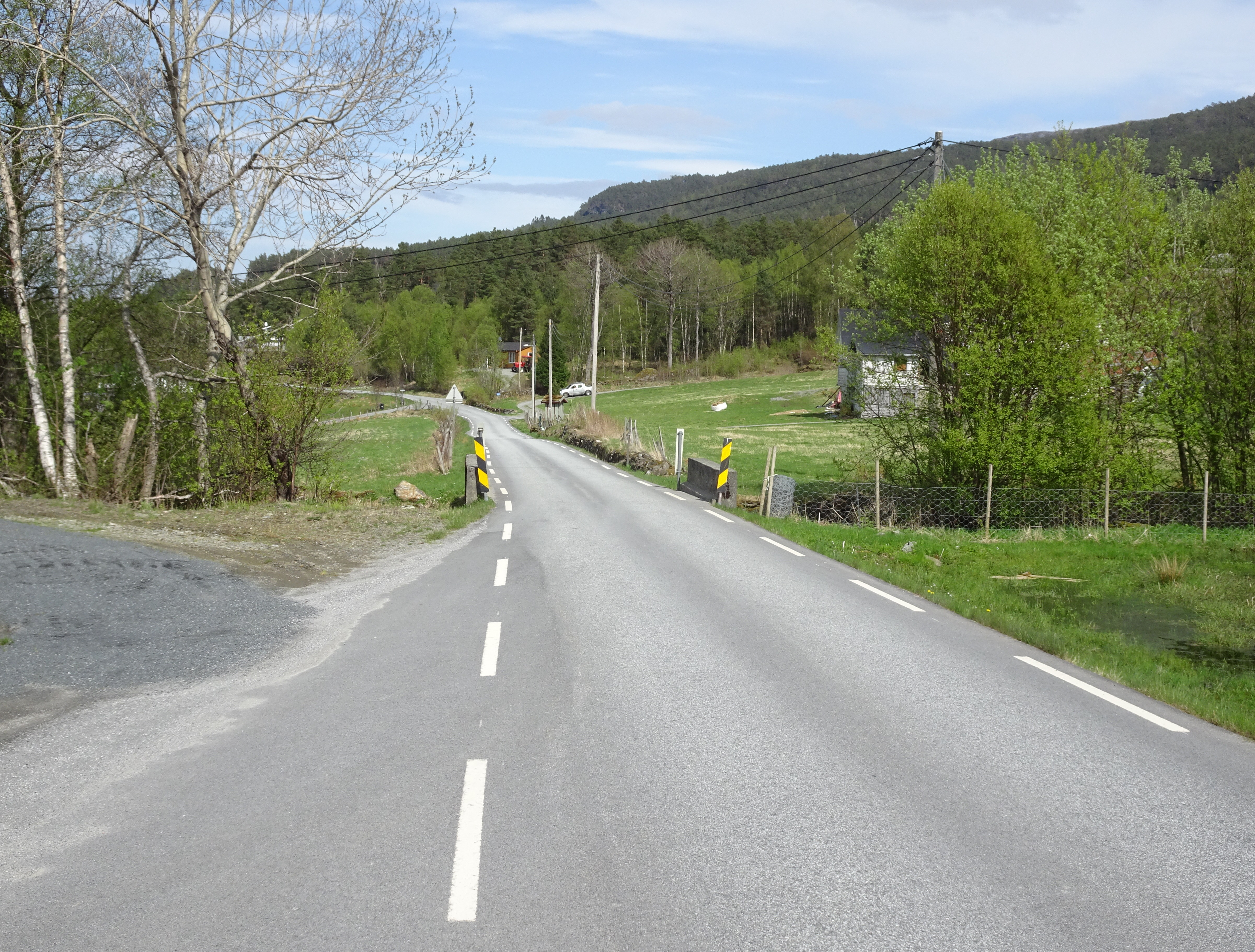 Strondavegen (fylkesvei 34) sørvest for Skånevik